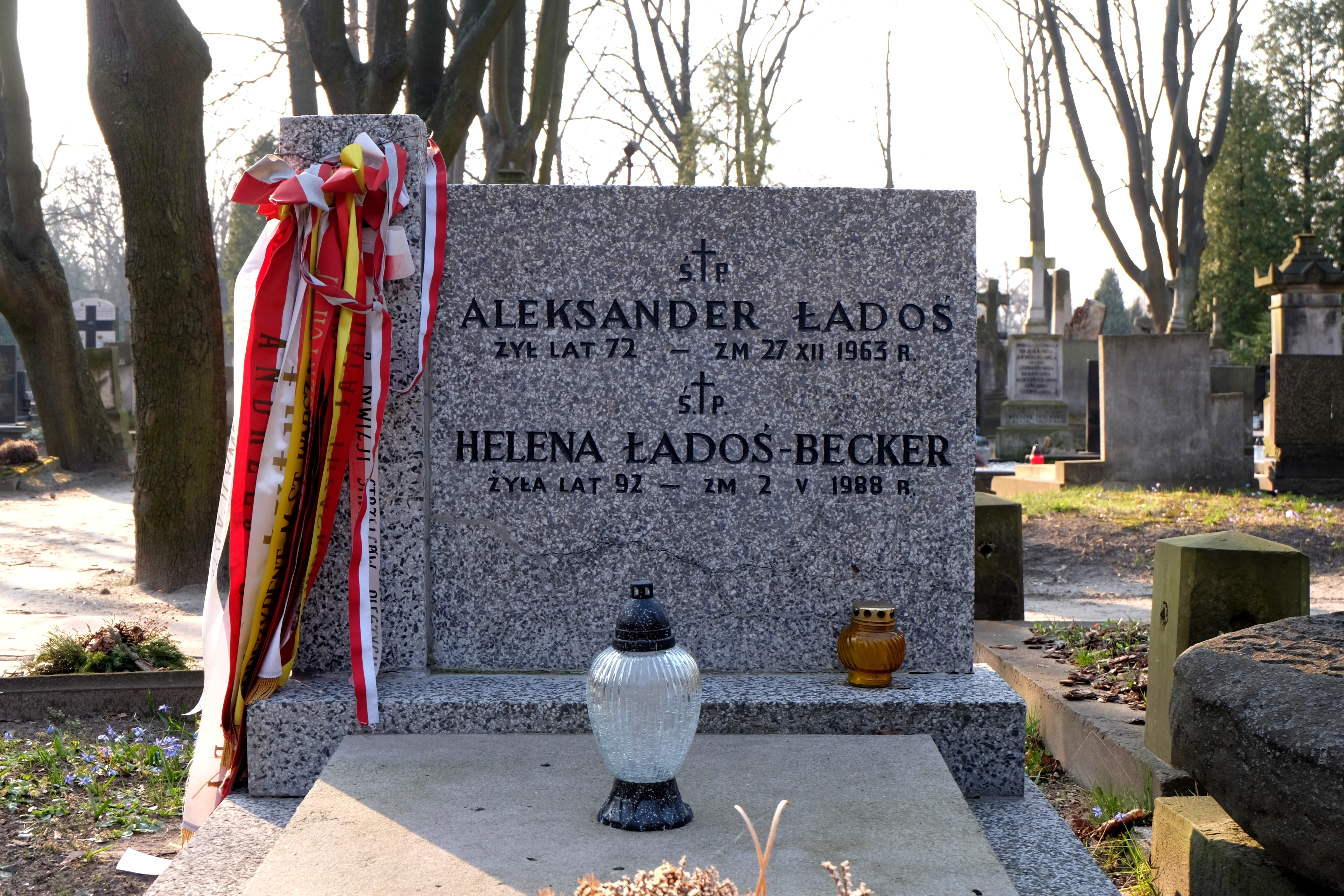 Grób dyplomaty Aleksandra Ładosia na Cmentarzu Powązkowskim w Warszawie